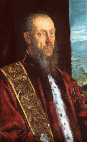 Ritratto di Vincenzo Morosini intorno al 1580 olio su tela